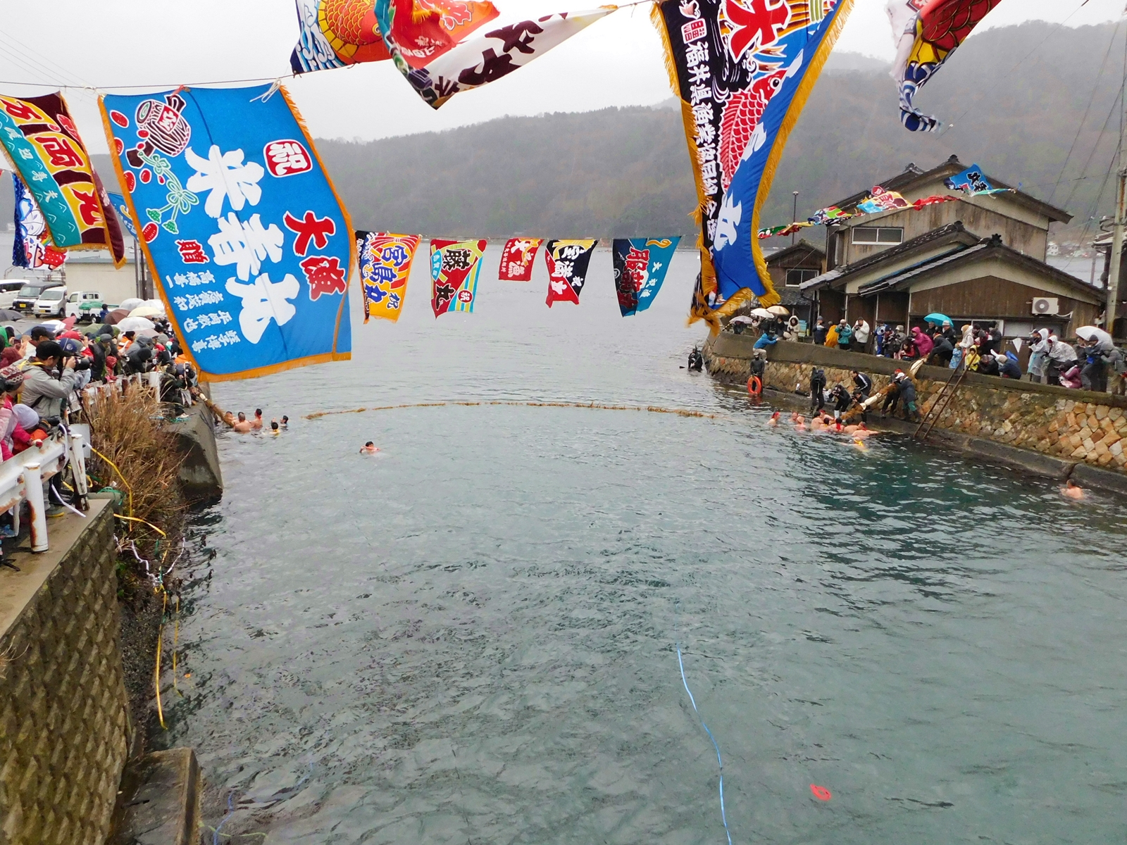 福井県美方郡美浜町日向の水中綱引き行事、両岸に分かれて綱を引きちぎる